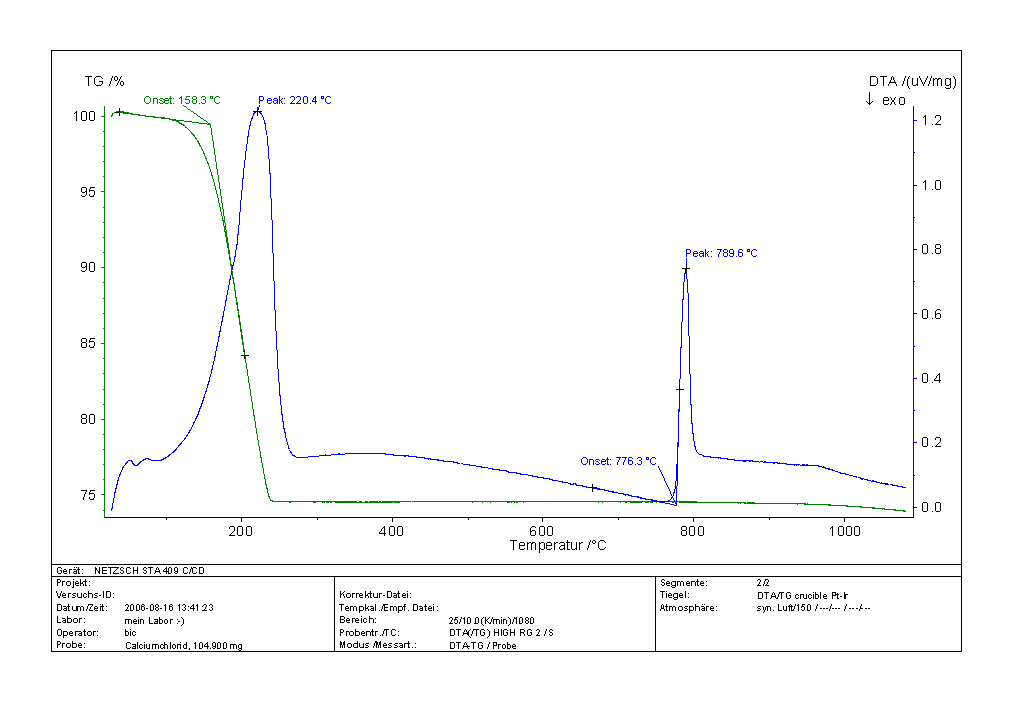 Abspaltung von Kristallwasser bei CaCl2 · 2 H2O in der DTA